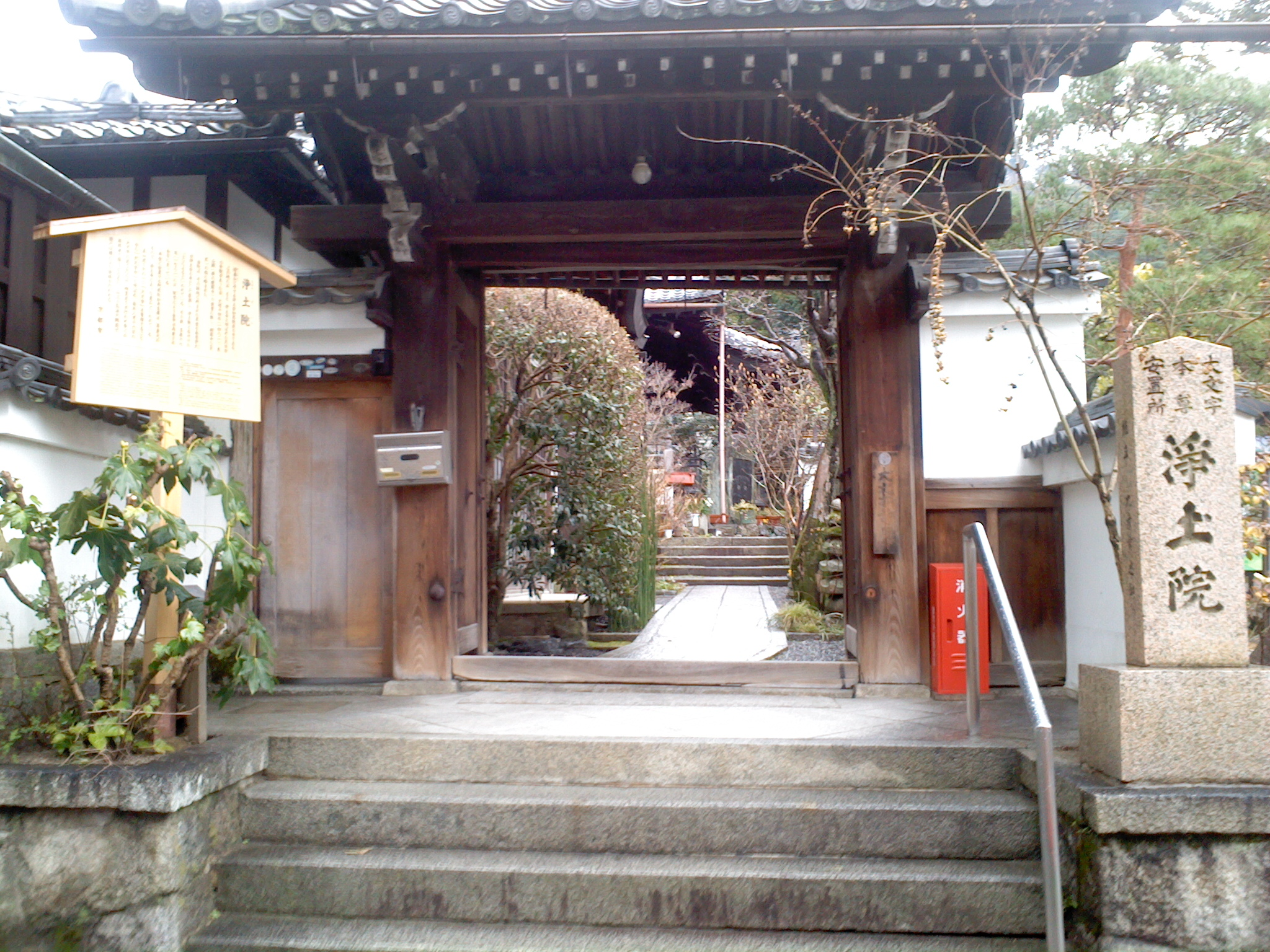 銀閣寺の隣、浄土院。通称大文字寺。